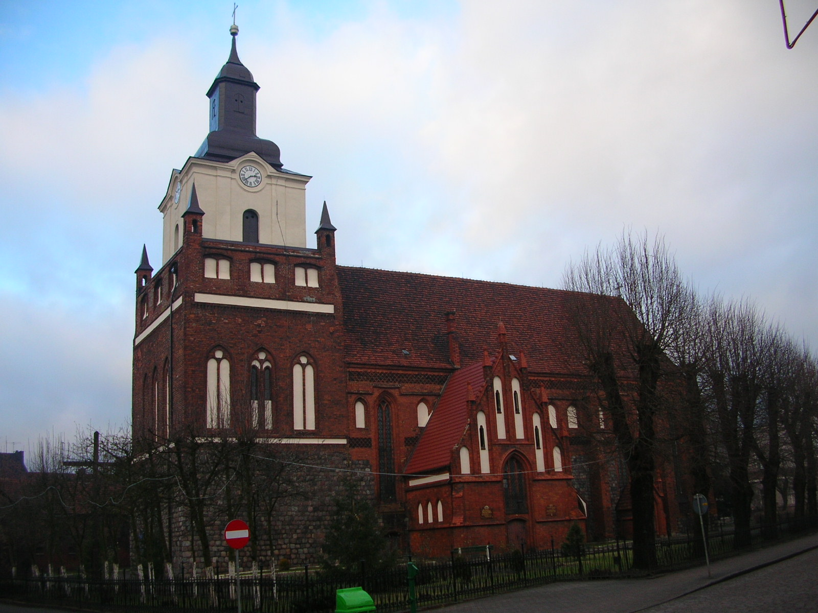 Mieszkowice - kościół Mariacki Autor - Bartek Wawraszko ( Bast )